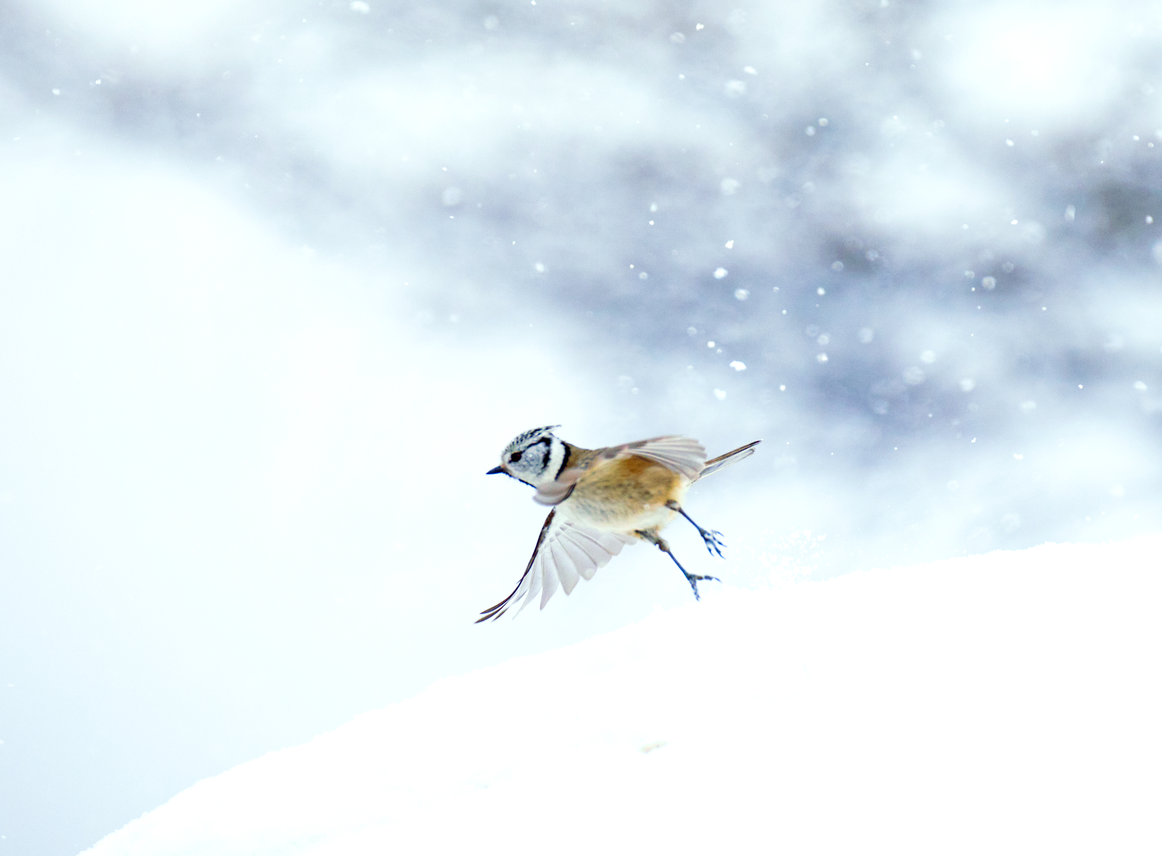 Parco nazionale dello Stelvio (Q1891711)